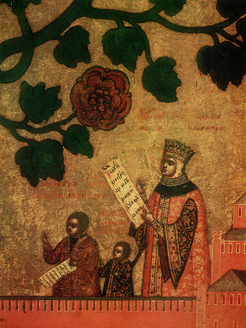 Богоматерь Владимирская — Древо Государства Московского